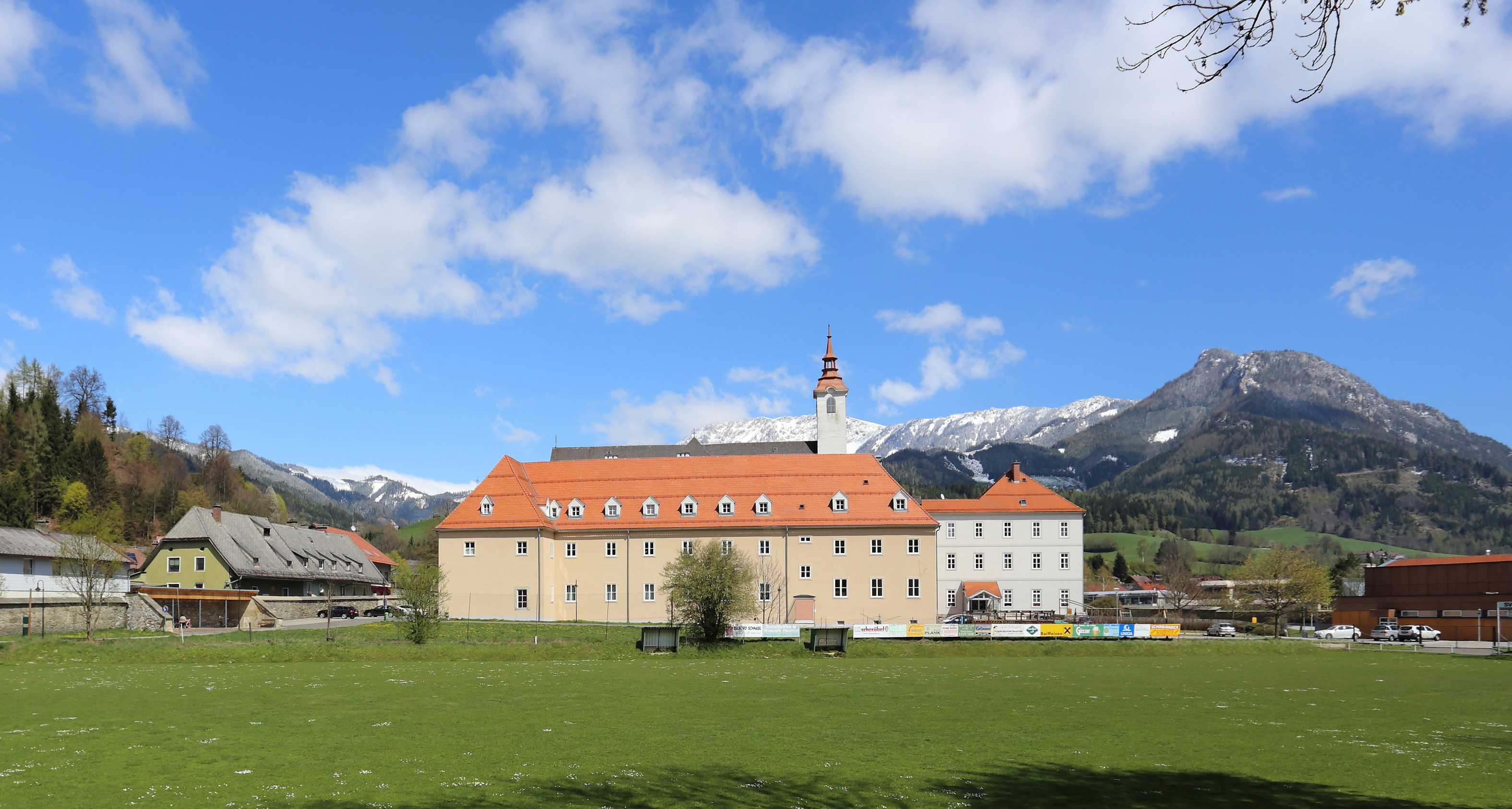 Südwestansicht des Redemptoristenklosters in der steiermärkischen Marktgemeinde Mautern. Im Hintergrund der Bergstock des Reiting mit Gößeck, Klauen und Gfällturm